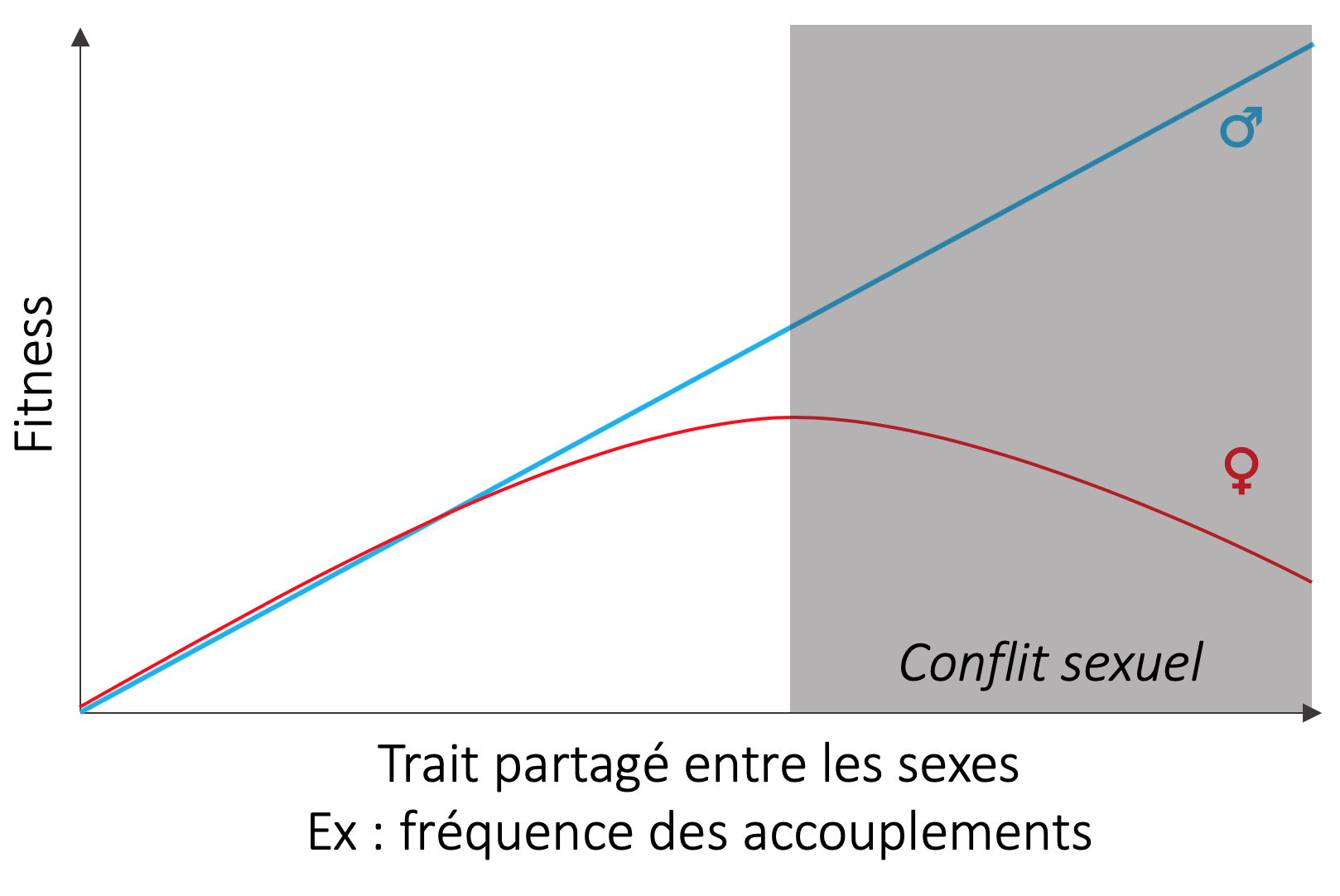 En ordonnée est la fitness, qui est ce que la sélection maximise, et qui peut se comprendre comme la quantité d’œufs fécondé par un individu. En abscisse, on représente n’importe quel trait partagé entre les deux sexes, comme par exemple le nombre d’accouplement par unité de temps dans une population. En rouge on a la fitness de la femelle en fonction du trait et en bleu celle du mâle. La forme des courbes ici est tiré d’un exemple classique détailler dans le texte. Ce qu’il est important de voir c’est que le conflit sexuel à lieu, par définition, lorsque les fitness des femelles et des mâles se comportent de façon par rapport au trait. Dans tous les autres cas on ne parle pas de conflit.